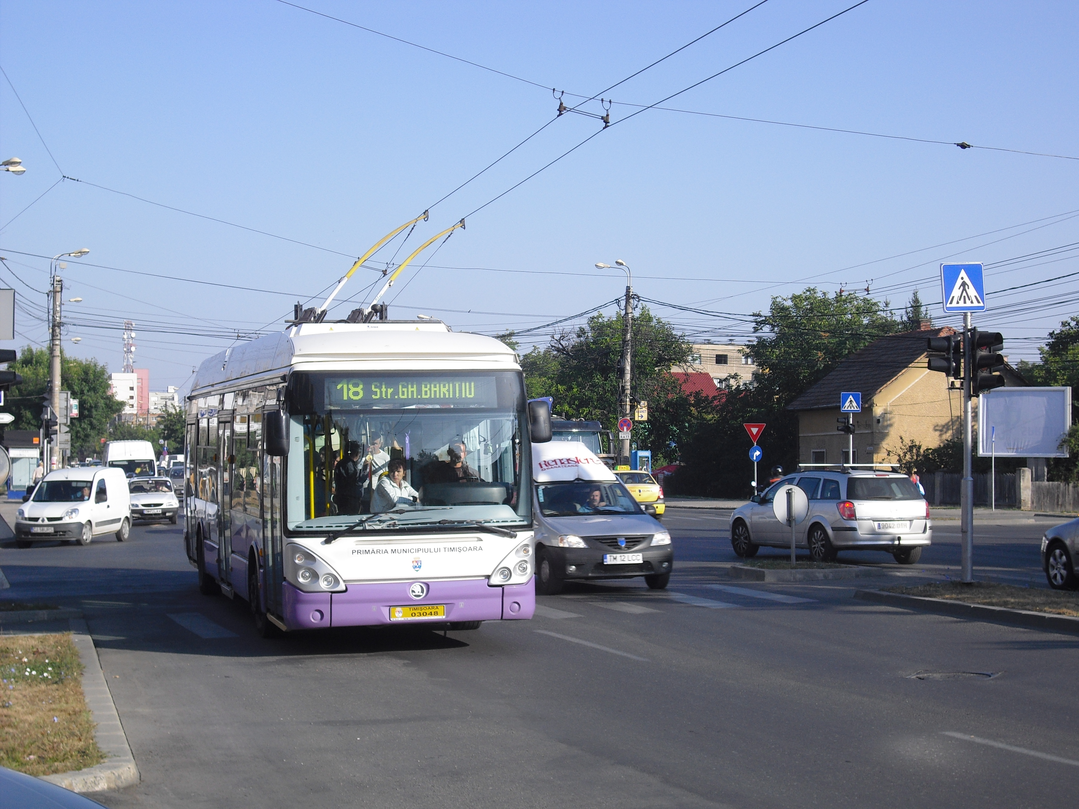 Trolleybus in Timişoara (Rumänien)